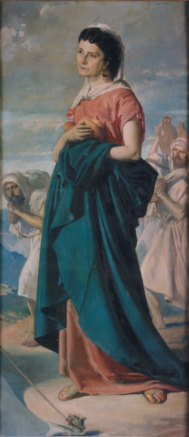 La obra representa a Abigaíl, que fue una de las esposas del rey David.